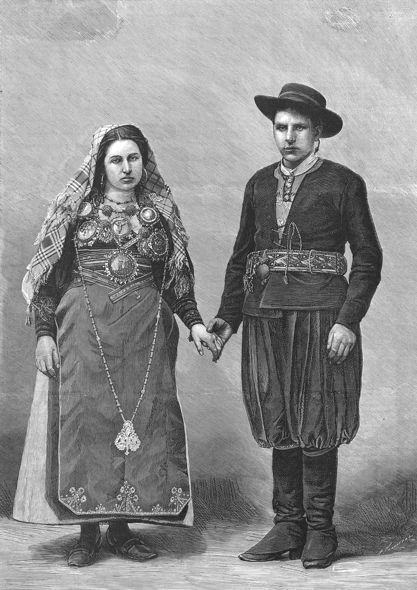 Maragatos del partido de Astorga, provincia de León. Grabado de Arturo Carretero a partir de fotografía de Laurent, publicado en la revista española La Ilustración Española y Americana.